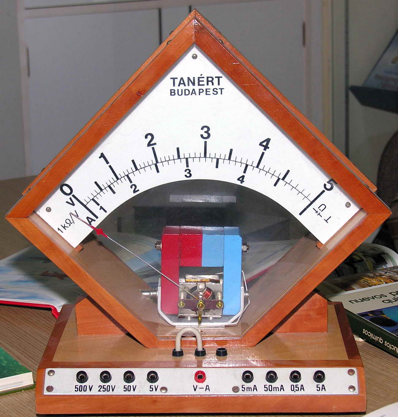 self made